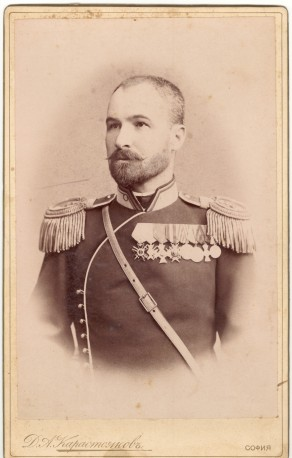 Генерал Никола Генев (1856-1934)